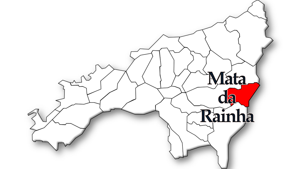 População